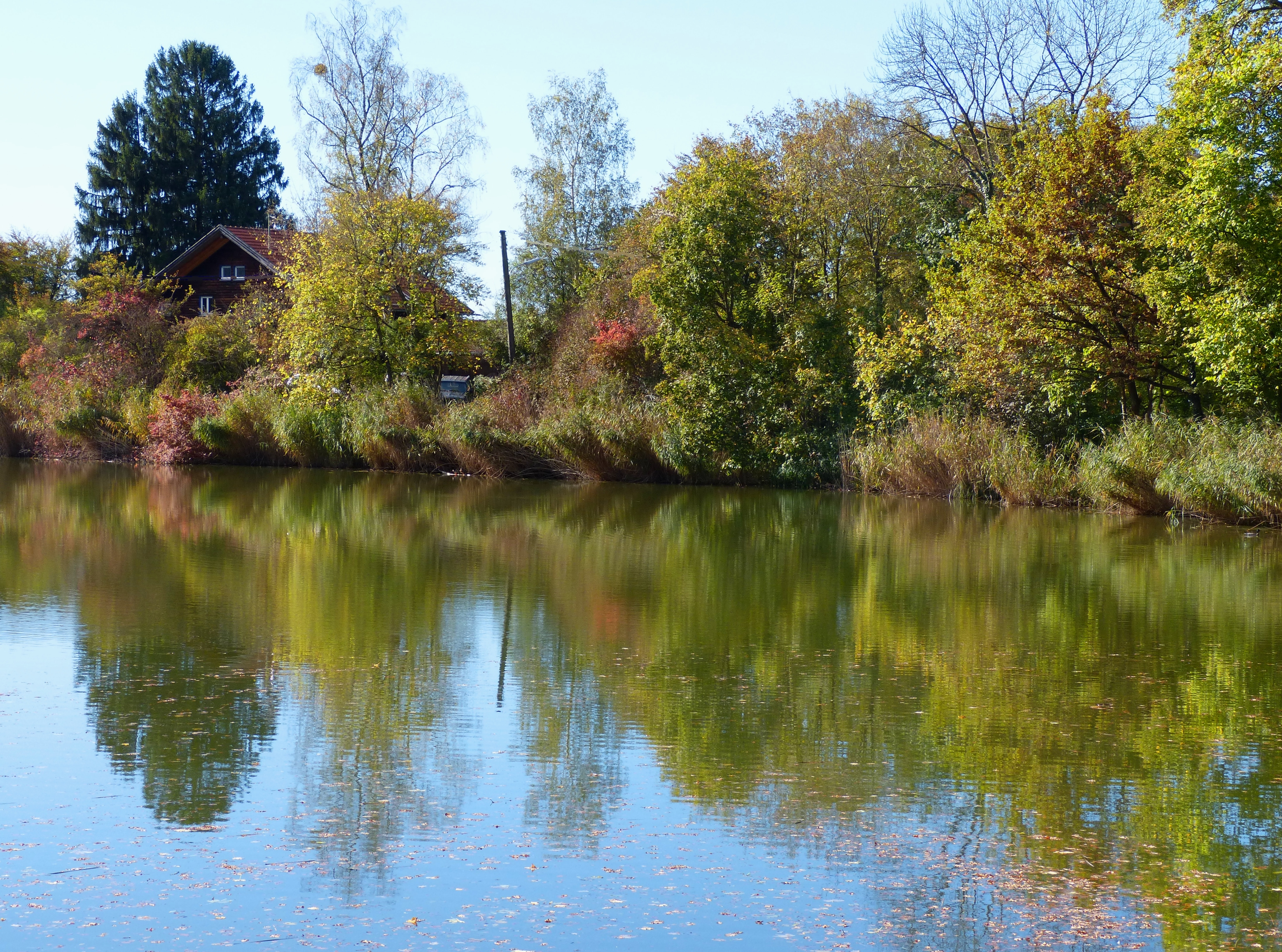 Widdersberger Weiher